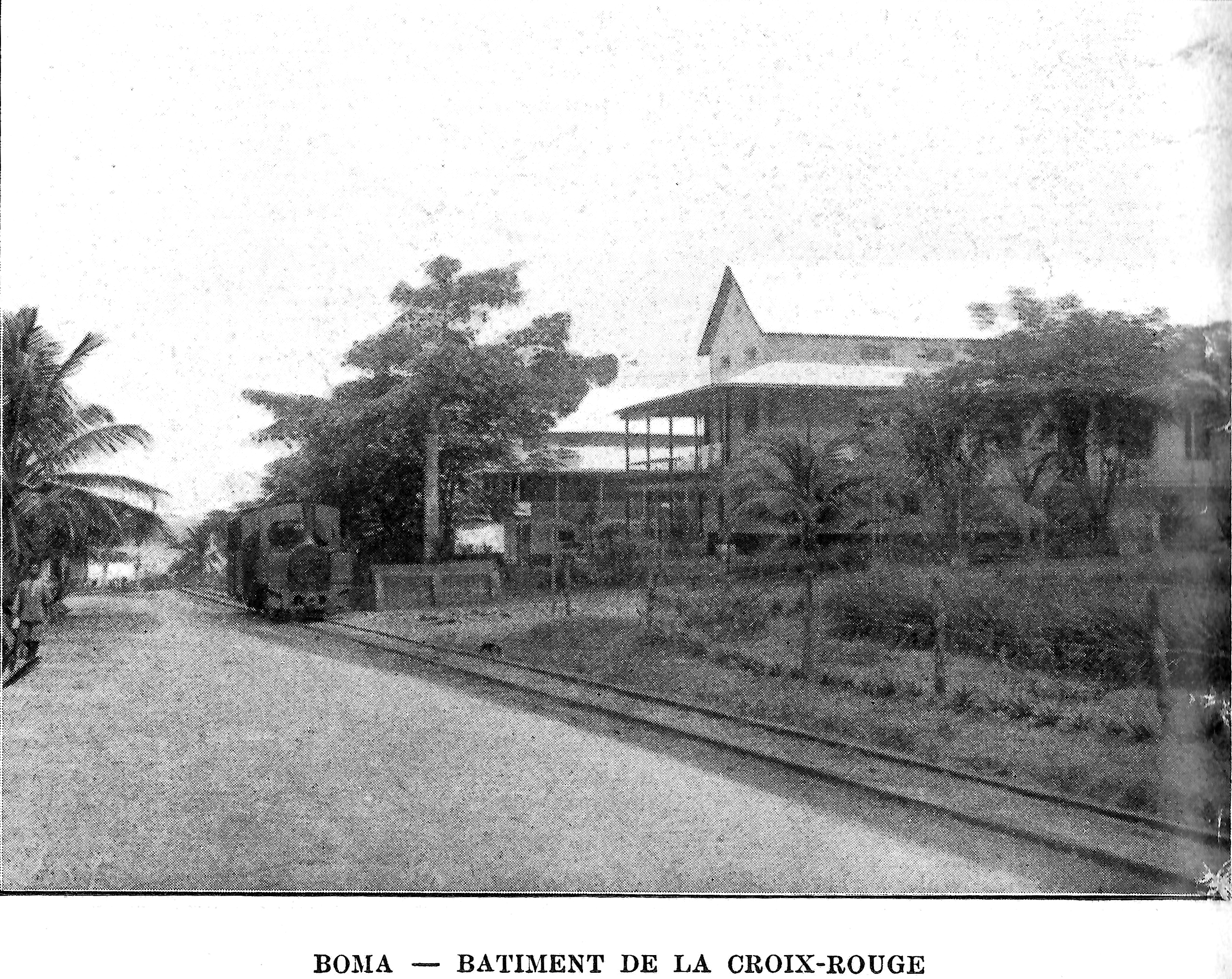 Batiment de la croix-rouge et train vicinal